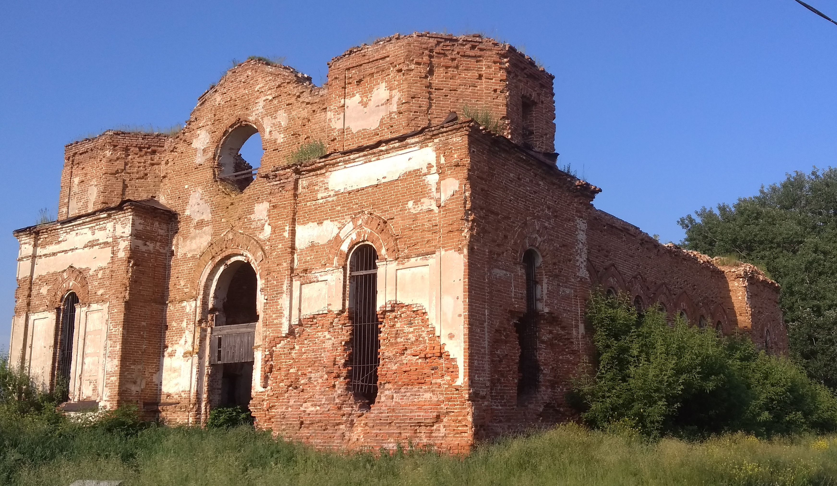 Введенская церковь с. Чемодановка Бессоновского района Пензенской области, 1862-1866 гг., русско-византийский стиль. Закрыта в 1933 г.